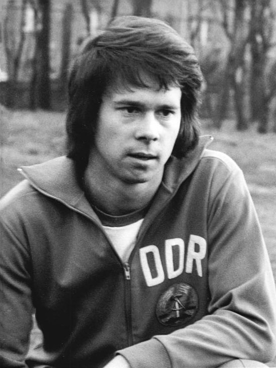 ADN-ZB Mittelstädt 3.5.74 Berlin: DDR-Spieler für die Fußball-Weltmeisterschaft 1974 in der BRD Zum Kandidatenkreis gehört Angriffsspieler Jürgen Sparwasser vom 1. FC Magdeburg.